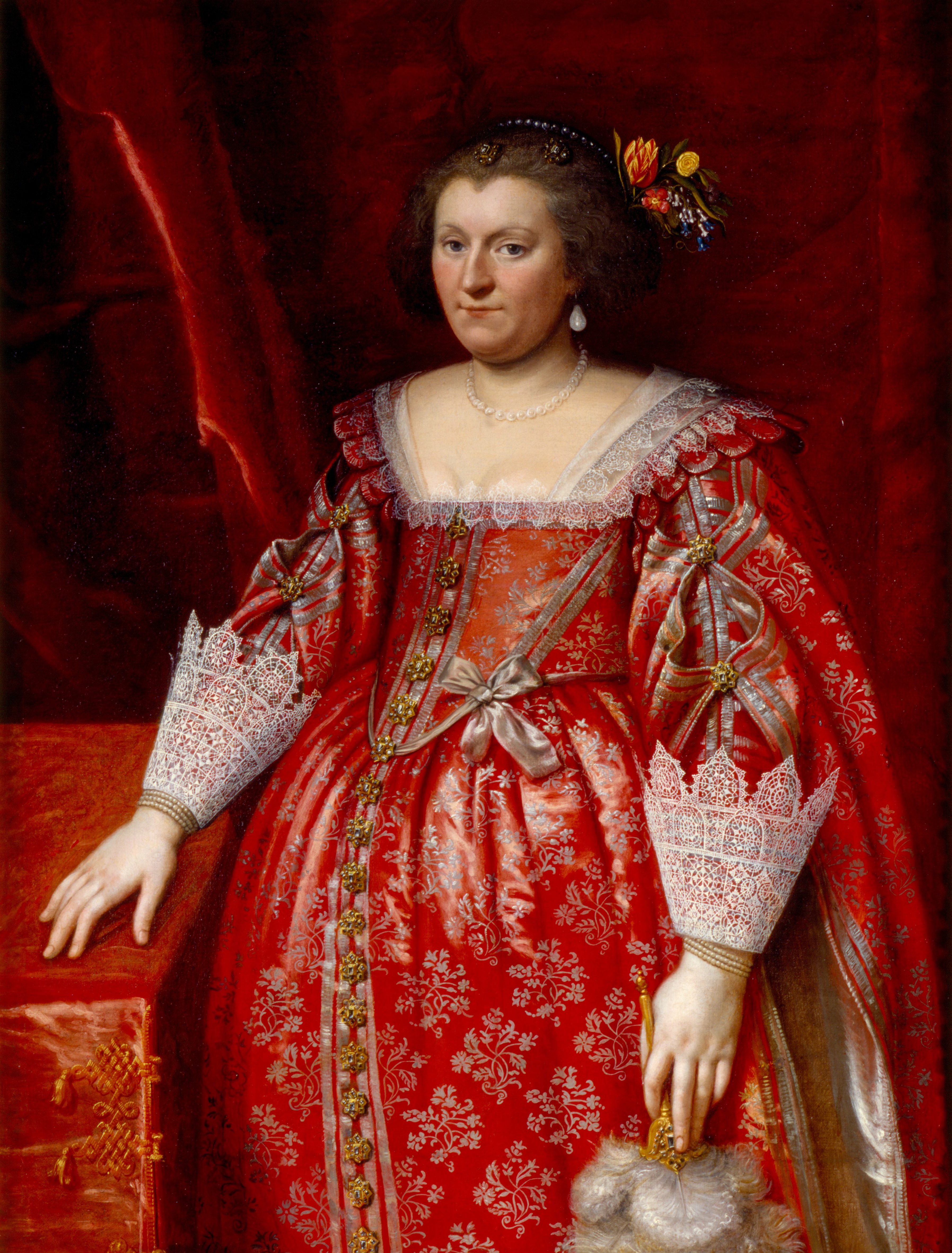 Portret van Sophie Hedwig (1592-1642) in de vorm van een kniestuk, de hertogin van Brunswijk-Wolfenbüttel is en face naar links weergegeven. Zij draagt een japon van rood gebrocheerd zijde met dito overmouwen, wit kanten manchetten en een platte kraag. Sophia Hedwig heeft een parelsnoer om de hals, parels in haar oren en in het haar. Op haar hoofd heeft zij bloemen, waaronder een rood-gele tulp. Sophia Hedwig heeft haar rechterhand op tafel, in haar linkerhand heeft zij een waaier van veren. De hertogin van Brunswijk-Wolfenbüttel staat voor een rood stoffen achtergrond.